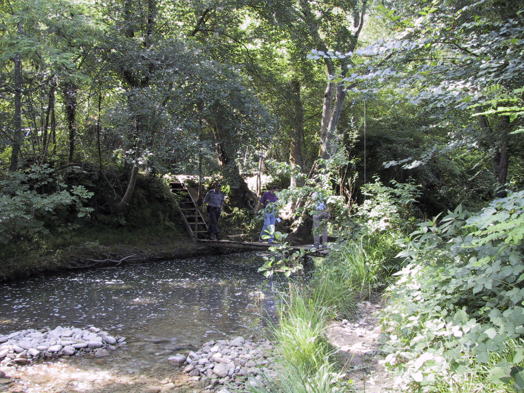 reka Dragonja v Senjaku